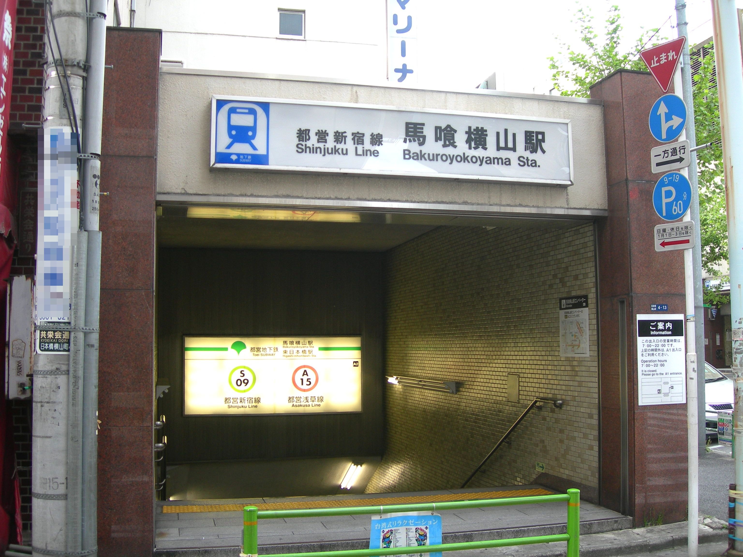 都営地下鉄新宿線馬喰横山駅A2番出入口